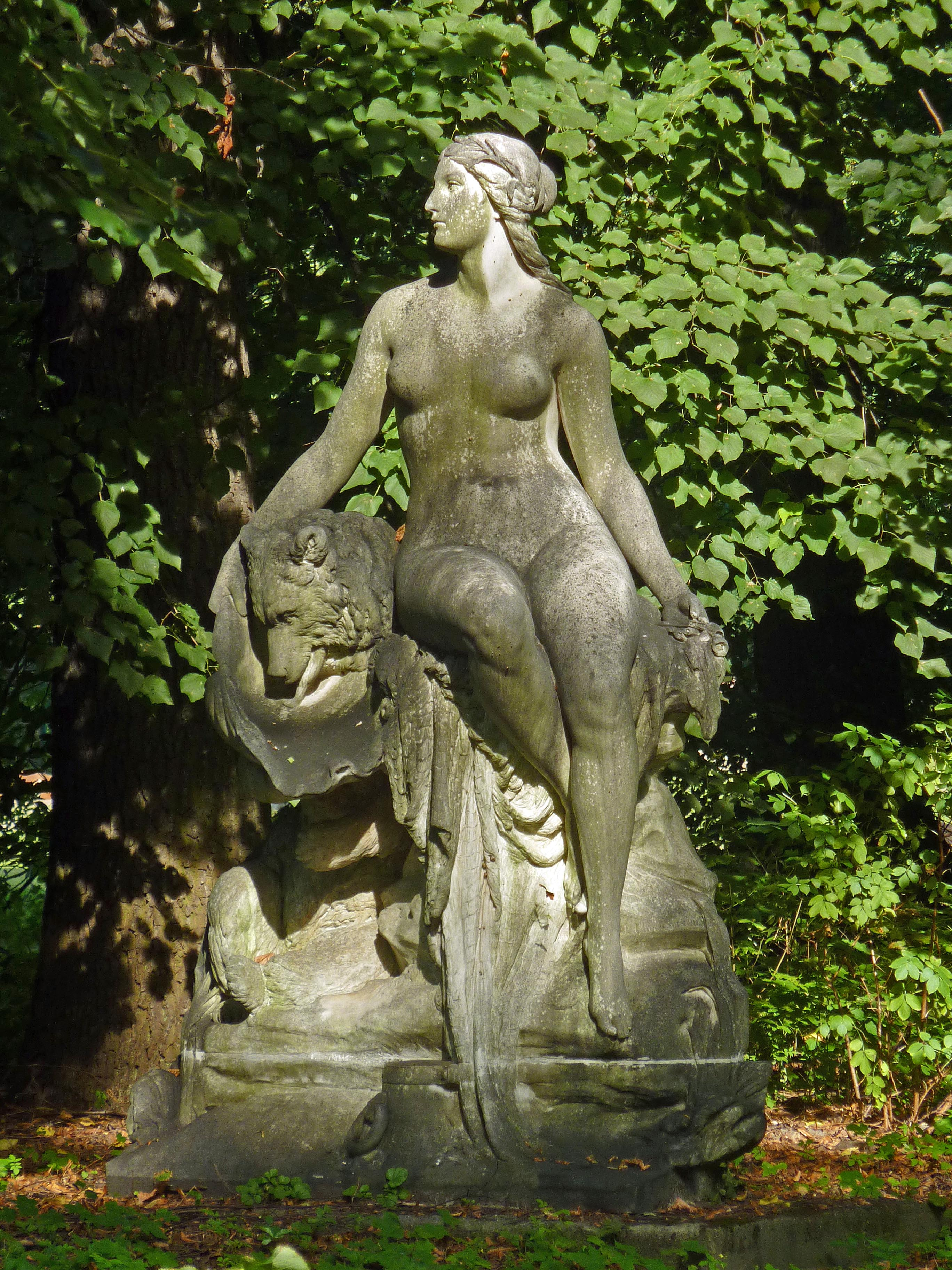 Marmorskulptur 'Sprea' von Jeremias Christensen aus der zweiten Hälfte der 1890er Jahren. Seit 1955 im Tierpark Berlin, zwischen dem Lennéhügel und der Guanakowiese.